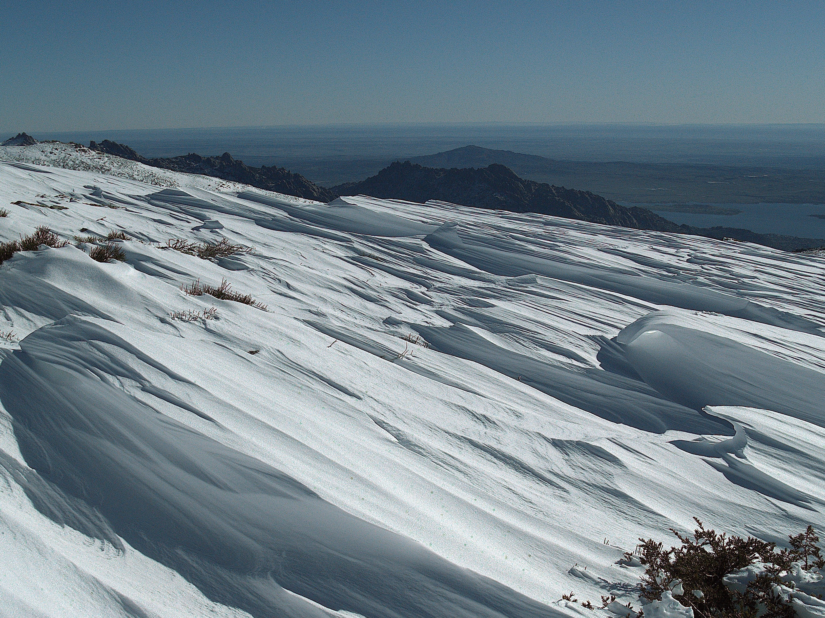 Photos taken in Sierra de Madrid (Bola del Mundo - Maliciosa).